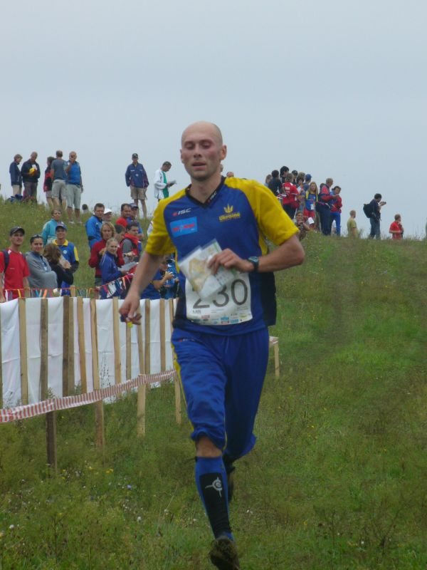 Yuri Omeltchenko, WOC2007, Kiev Ukrain